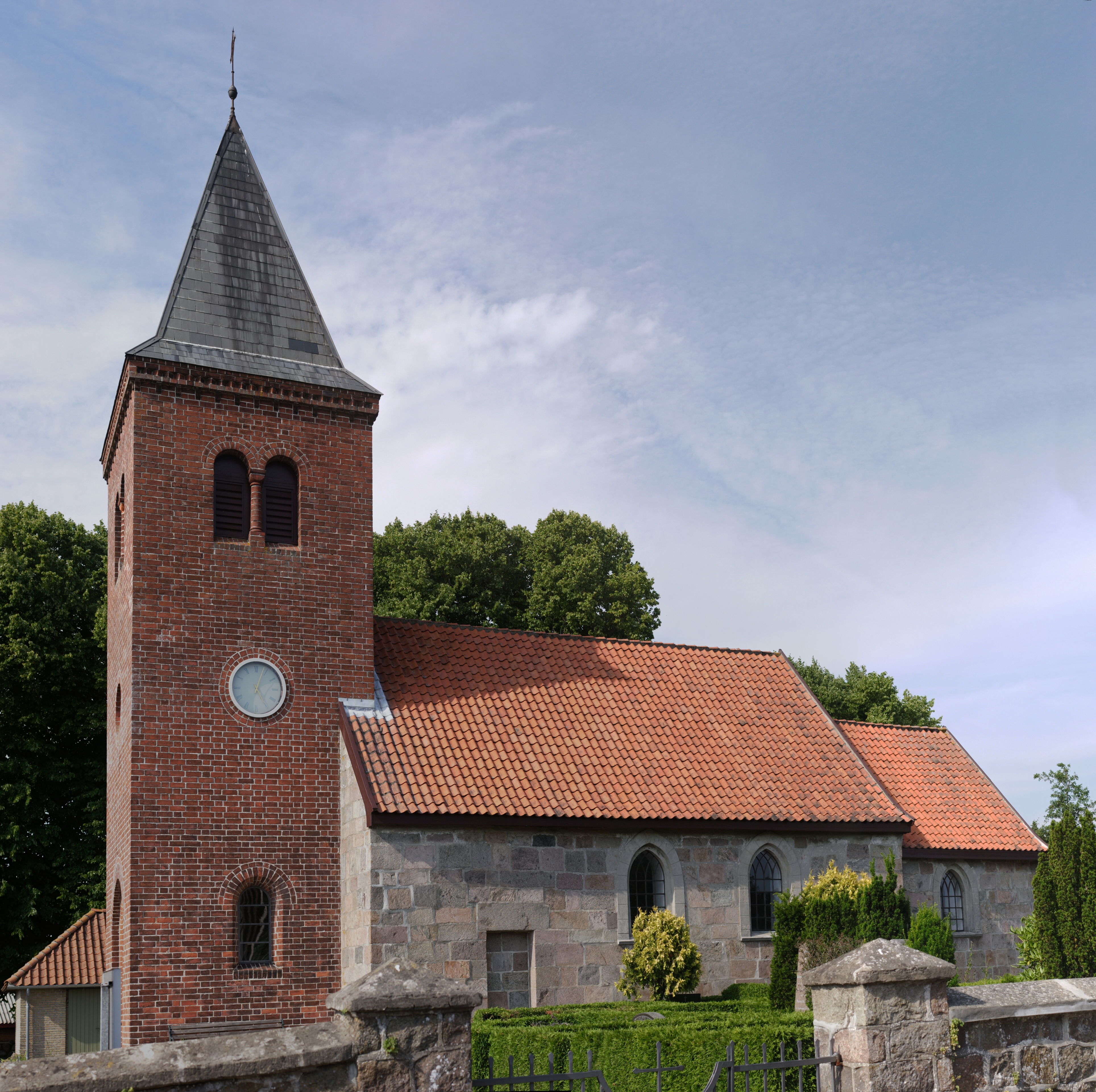 Ølsted Kirke